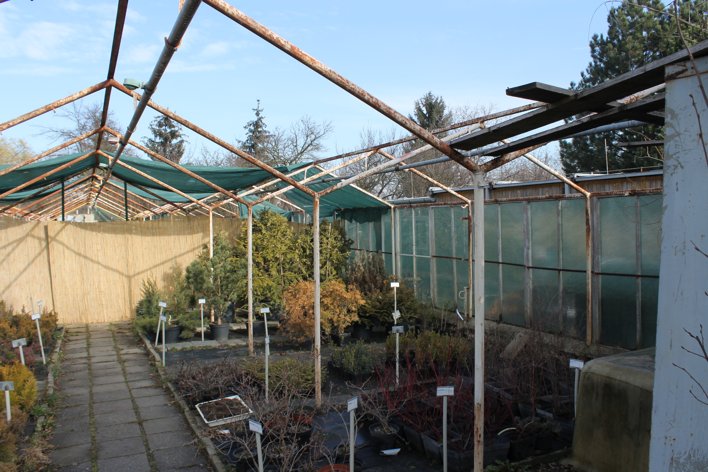 japan, oknový skleník, jih Moravy, stálé prvky skleníku